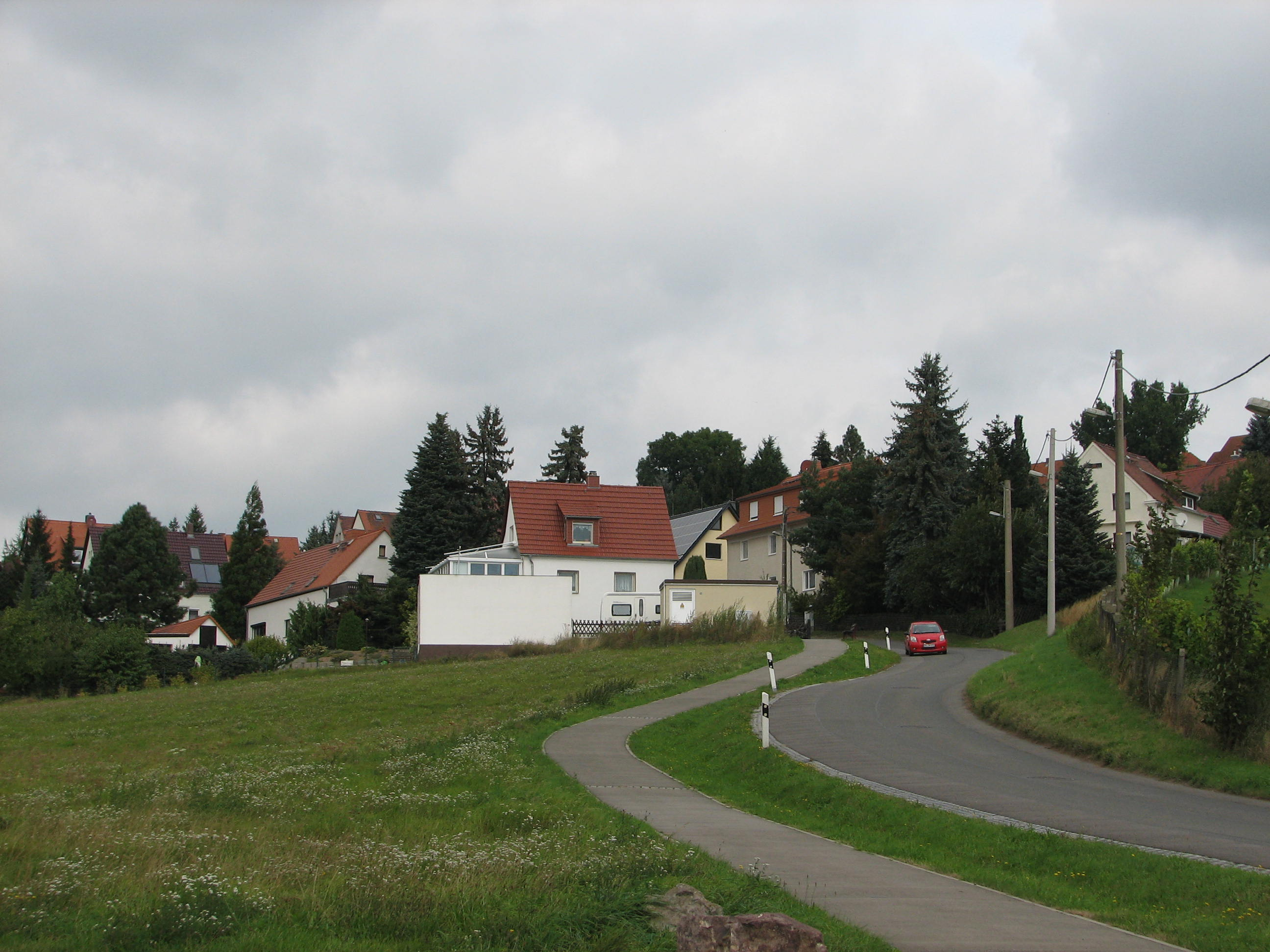 Blick vom Gasthof Kohlsdorf auf das Dorf, das sich entlang der Pennricher Straße erstreckt.